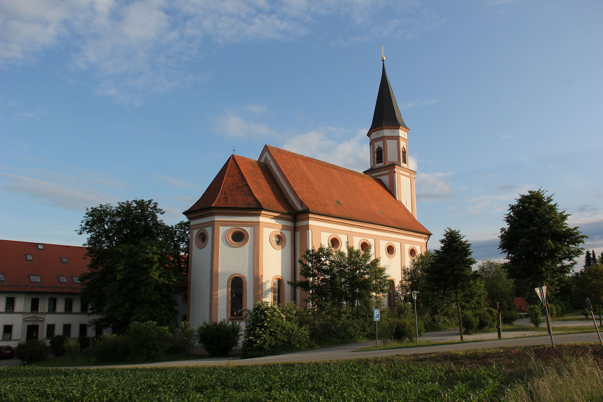 Wallfahrtskirche Heiligenbrunn Native nameWallfahrtskirche HeiligenbrunnLocationHeiligenbrunn, Lower Bavaria, GermanyCoordinates48° 40′ 09″ N, 12° 03′ 51″ E